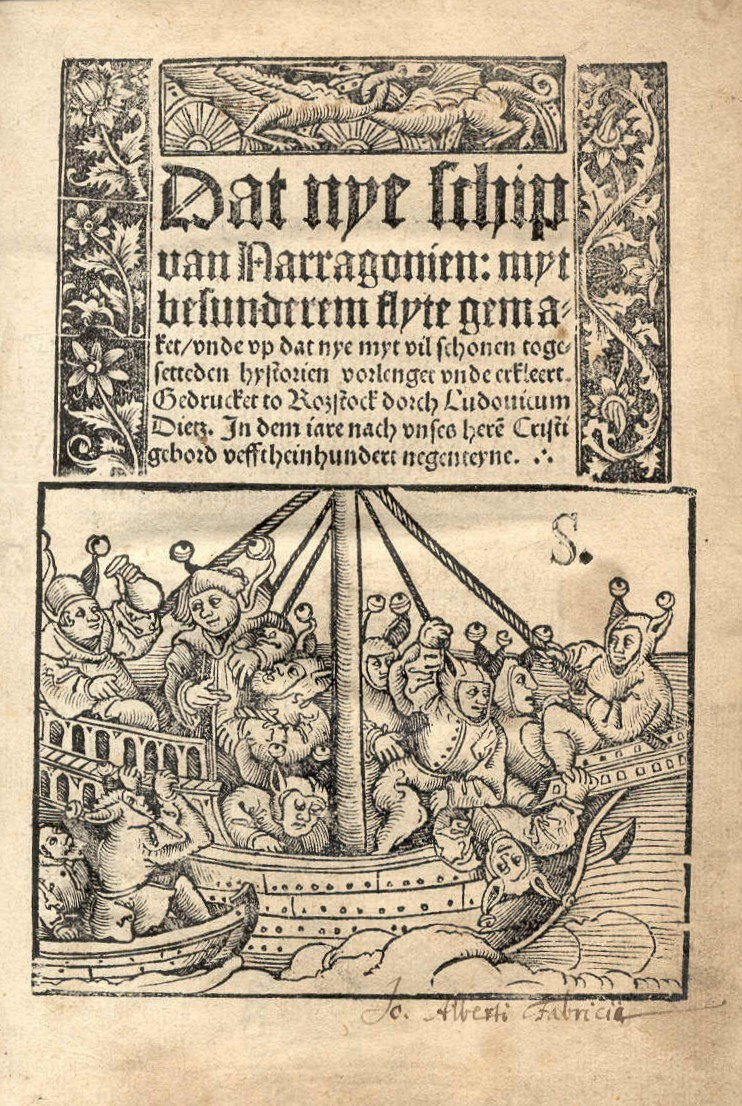 Titel der niederdeutschen Ausgabe von Brants Narrenschiff, gedruckt in Rostock, Ludwig Dietz, 1519